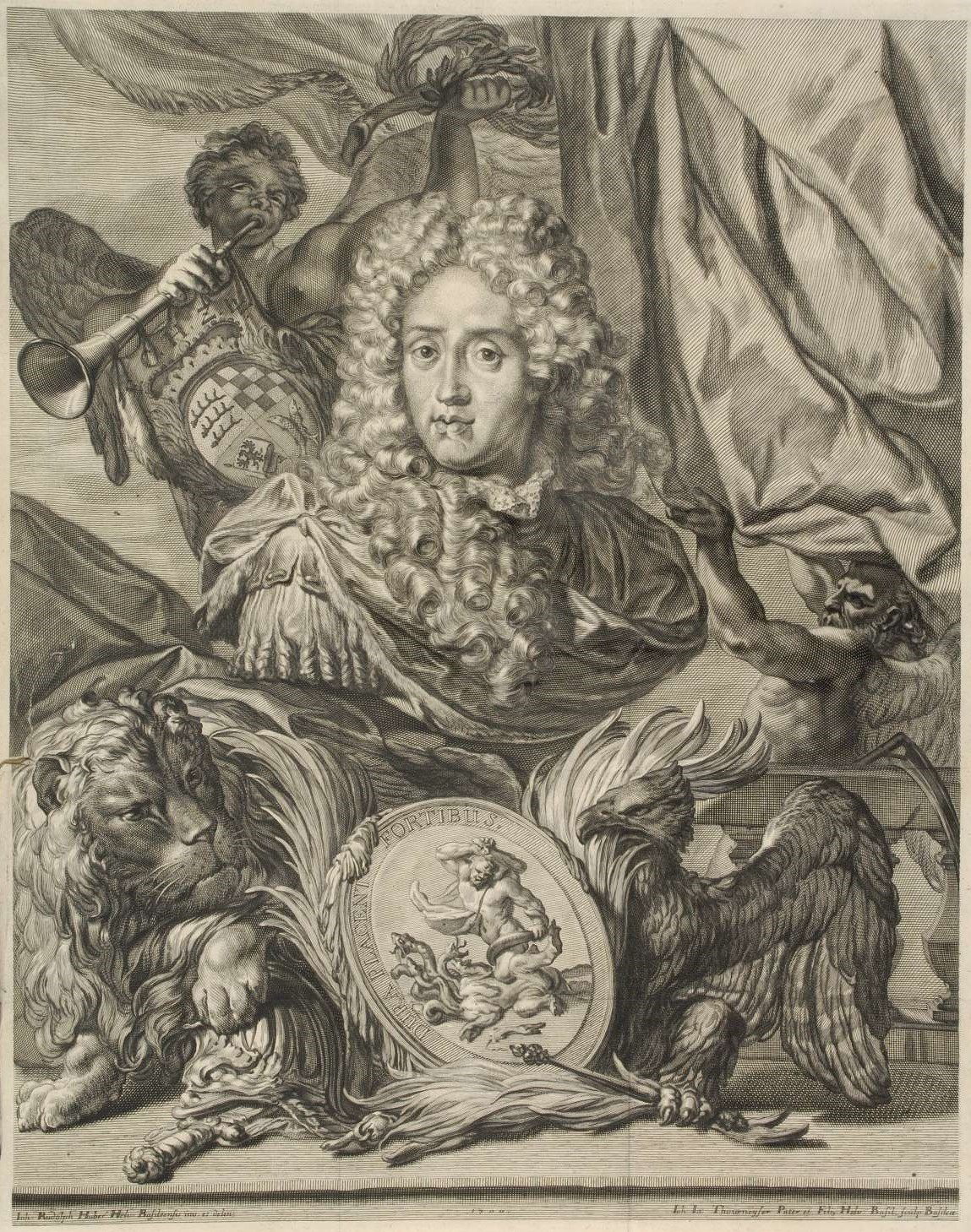 Herzog Friedrich Carl (1652 - 1698), kaiserlicher Generalfeldmarschall